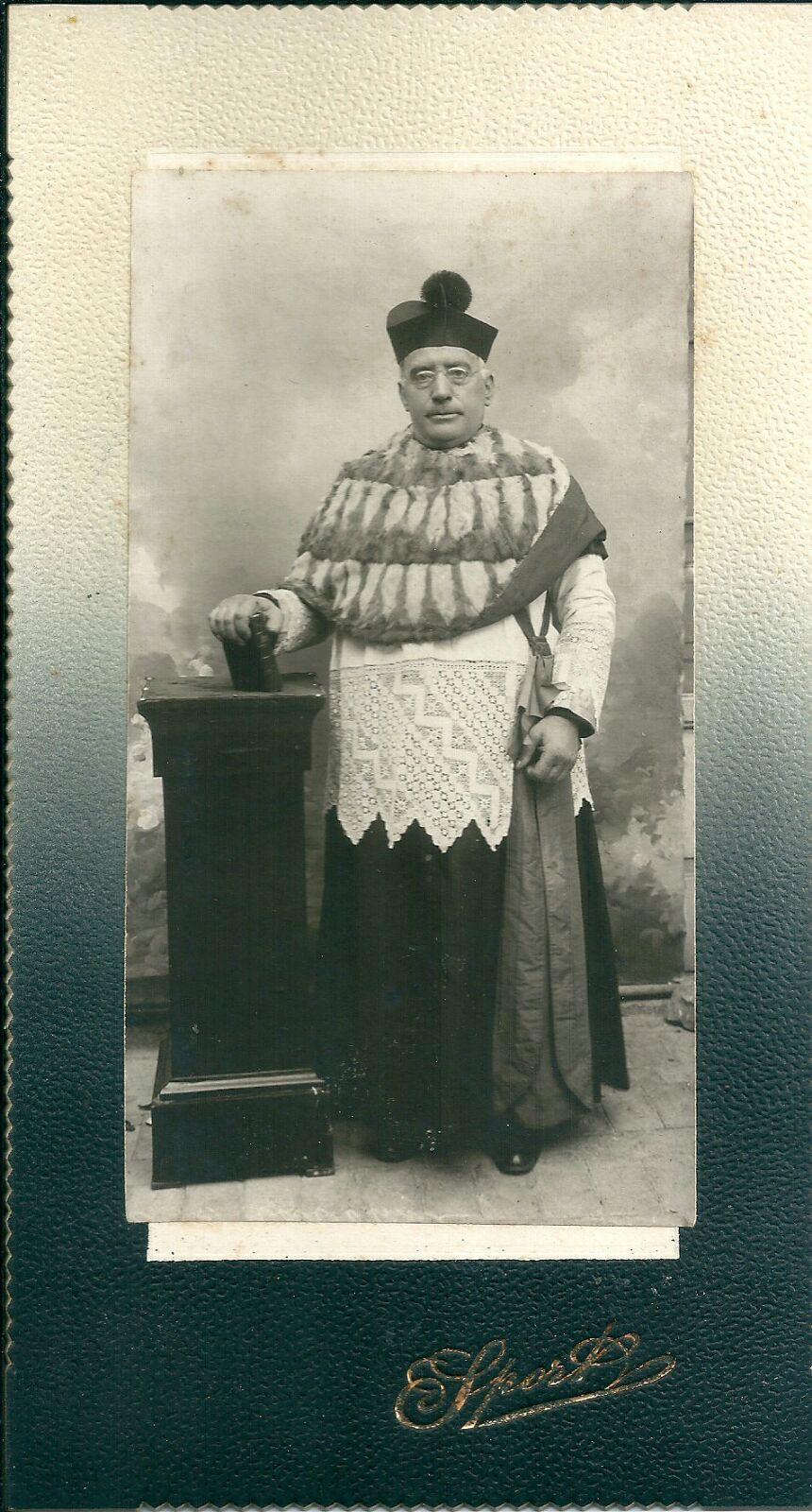 Ugo Colesanti 1860-1914